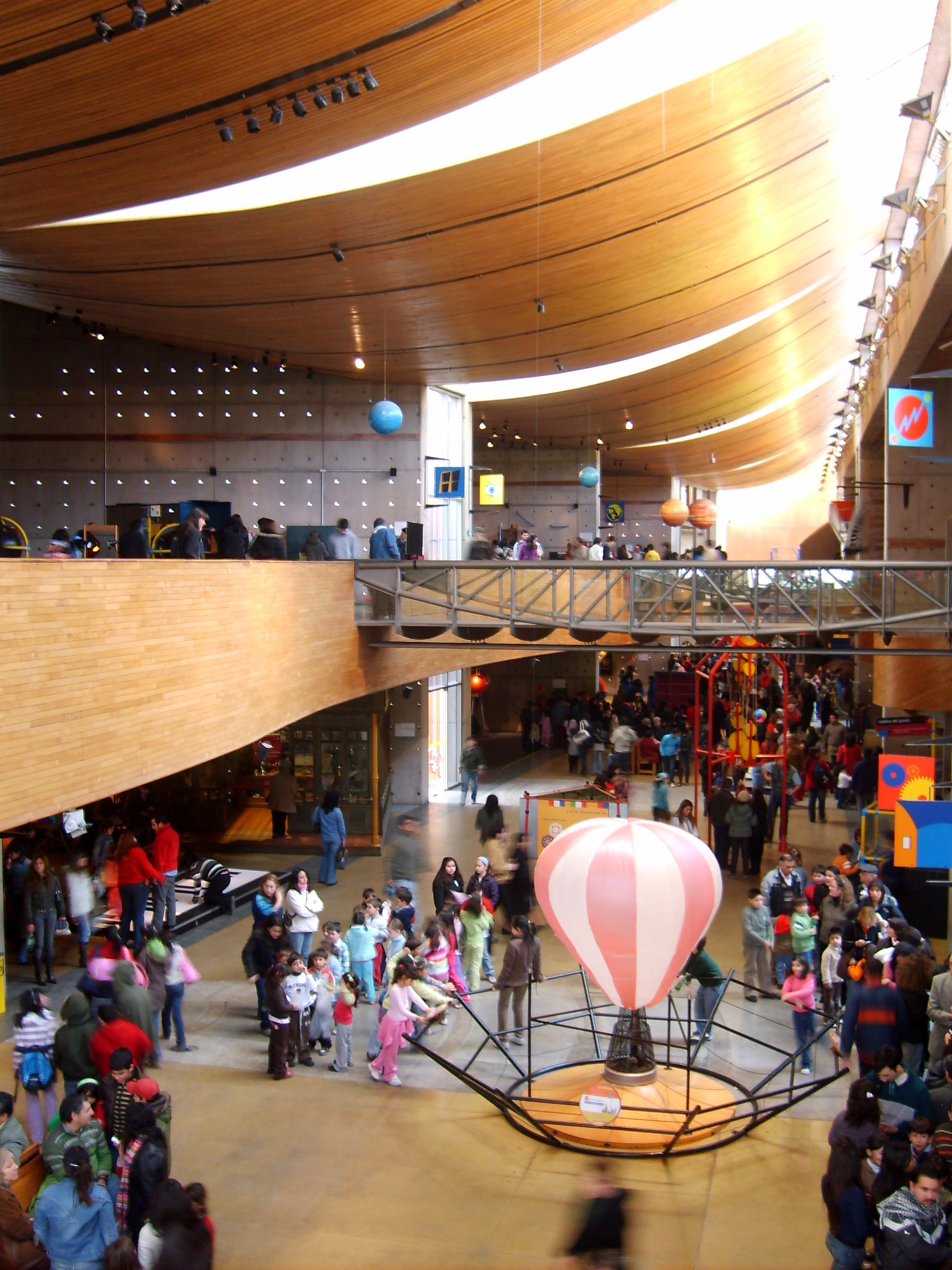 Interior del Museo Interactivo Mirador (MIM), durante las vacaciones escolares de invierno 2008. Ubicado en la comuna de La Granja, Santiago de Chile.